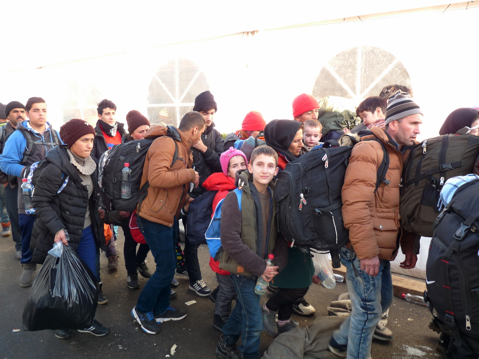 Begunci v Dobovi